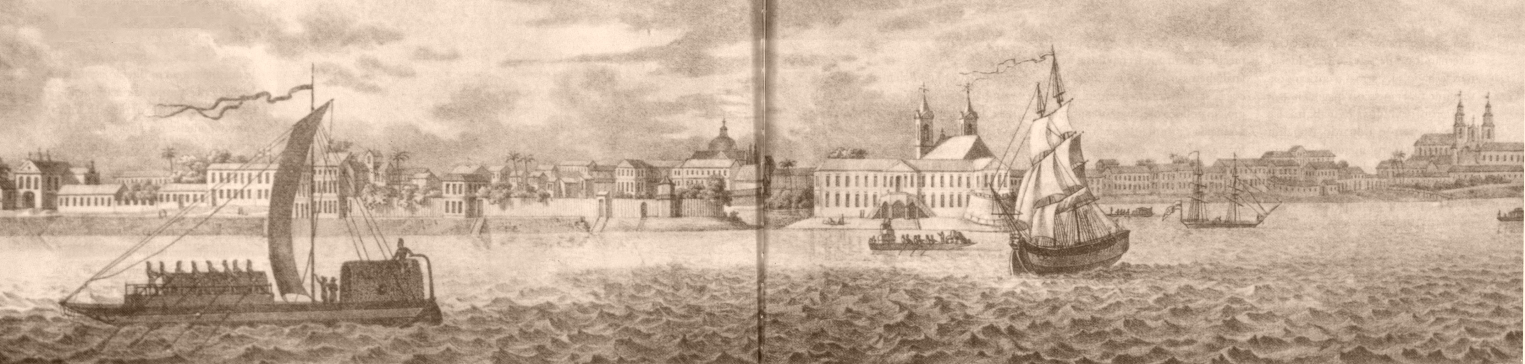 Belém do Pará, primeira metade do século XIX, no Atlas de Spix e Martius